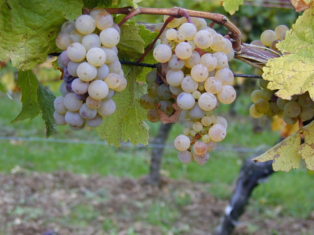 Afbeelding gekregen van Jean Trimbach (Elzas) voor GNU vrij gebruik